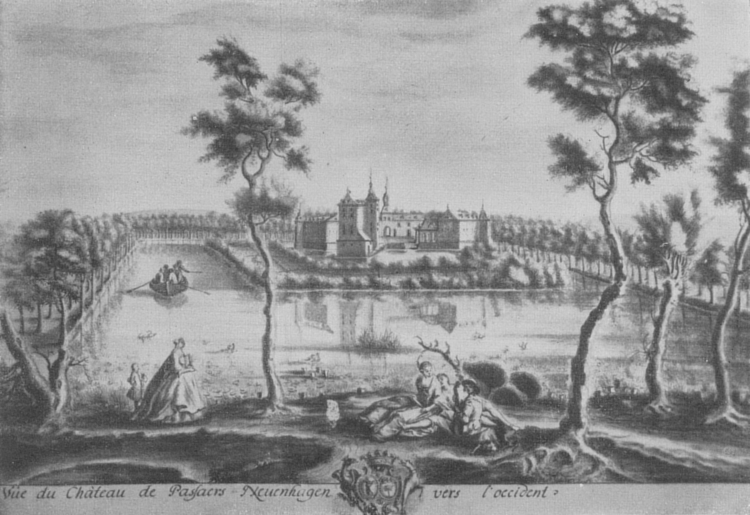 Schloss Passarts-Nieuwenhagen, alte Zeichnung